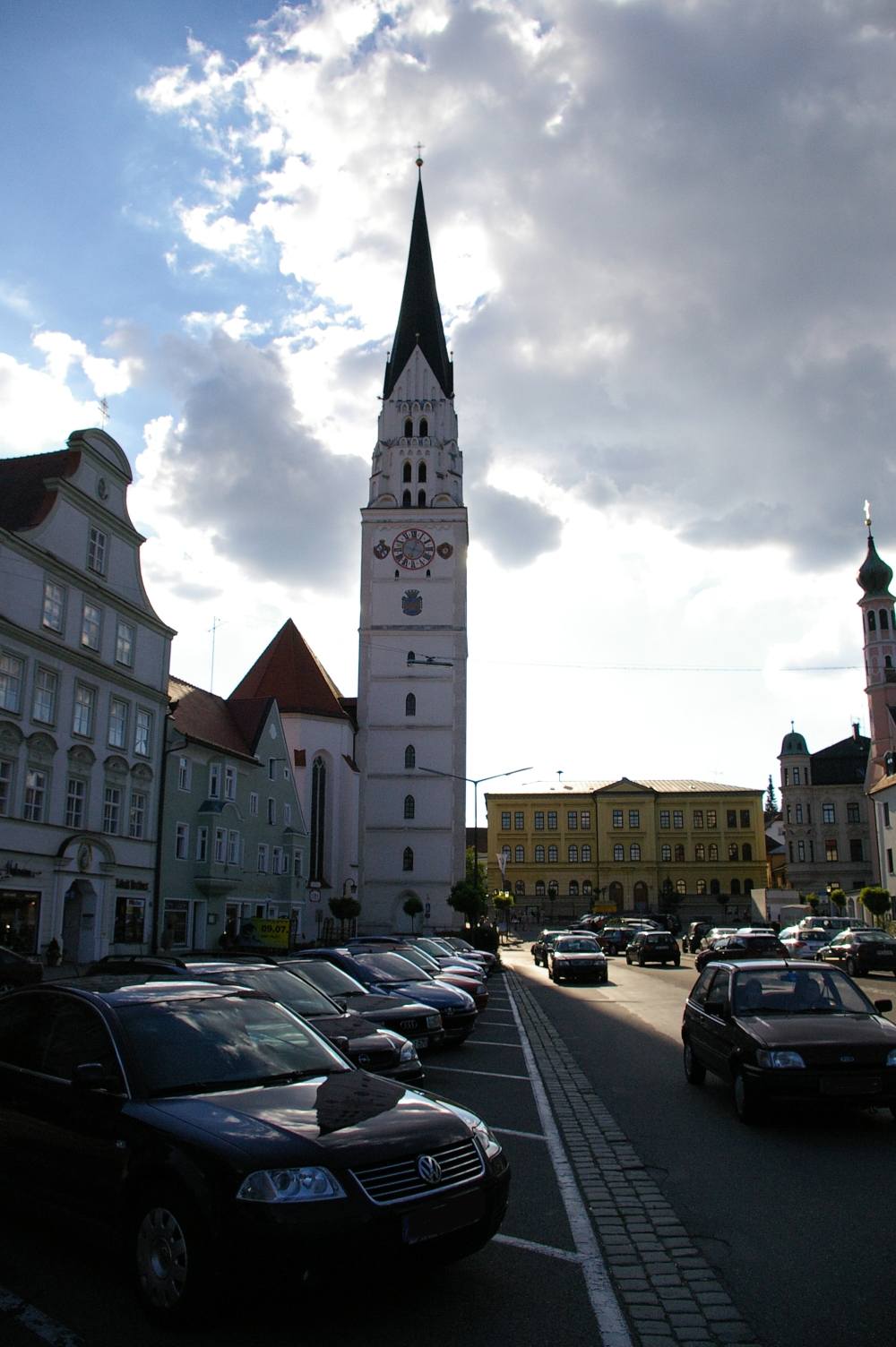 St. Johannes Baptist am Hauptplatz im Juli 2005.